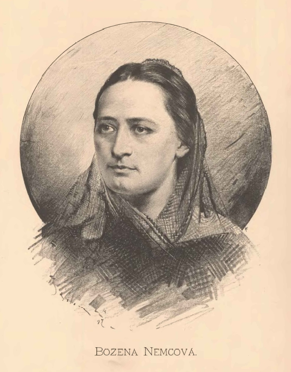 Božena Němcová (1816-1862), česká spisovatelka. Portréty předních osobností od Jana Vilímka